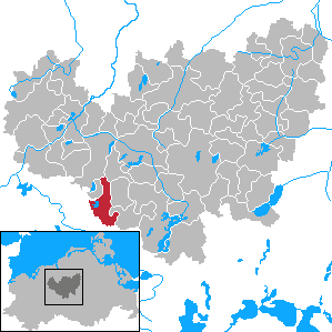 Lohmen in Mecklenburg-Vorpommern - District Güstrow